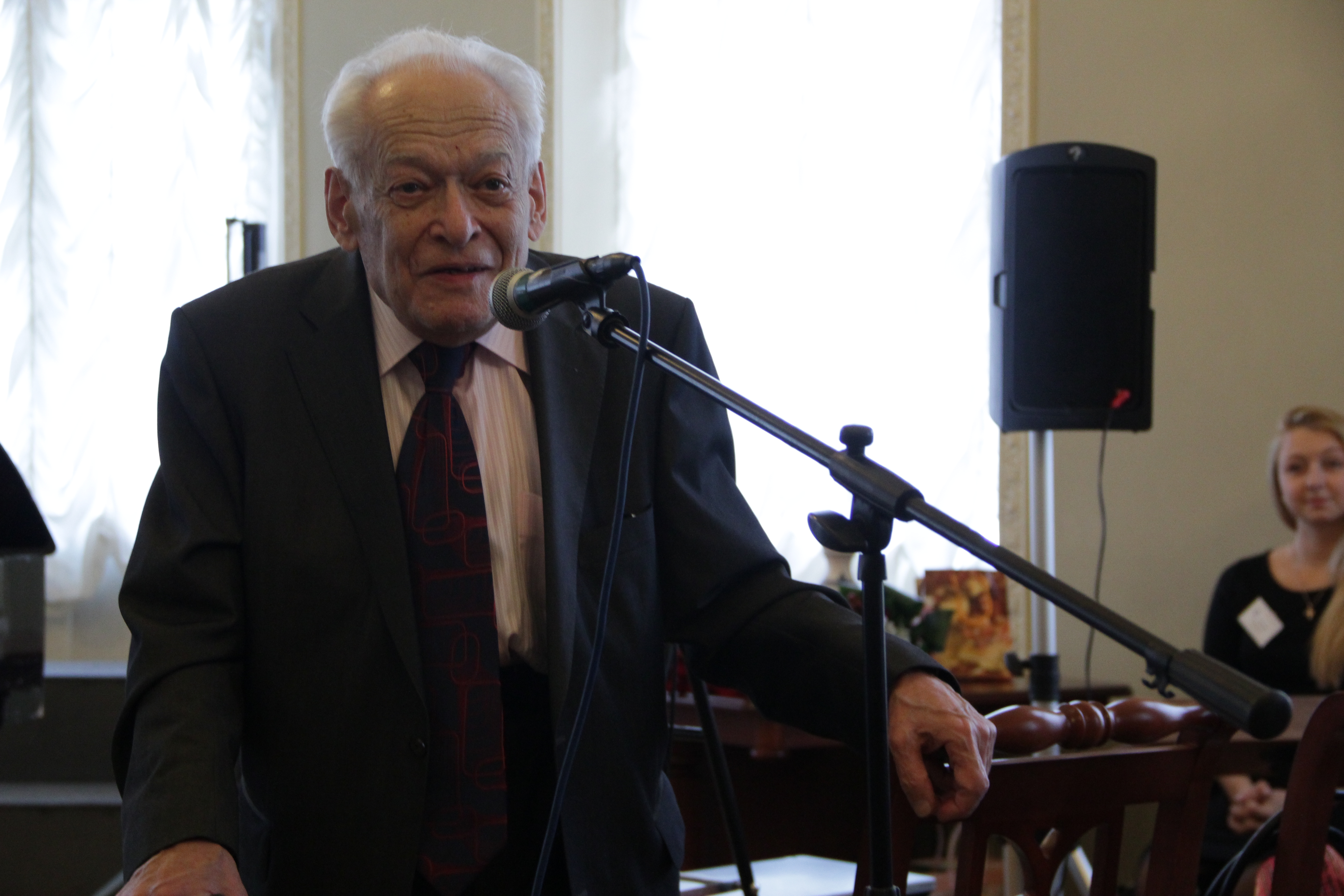 Доктор культурологии, профессор, член-корреспондент РАО Ариарский Марк Ариевич, выступает перед участниками конференции (Санкт-Петербург, 24 января 2013 года).